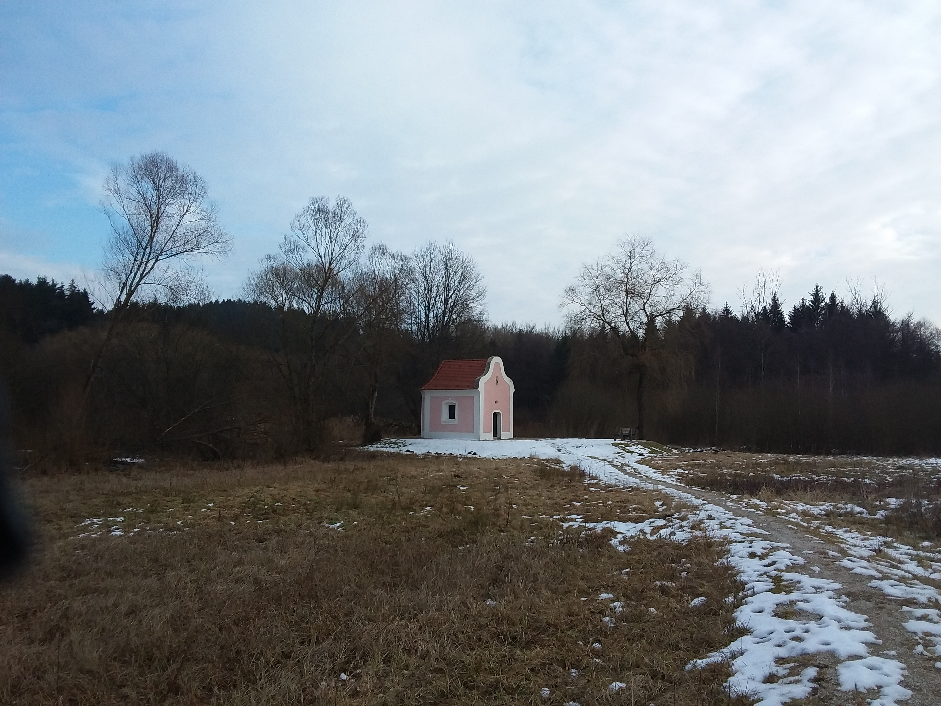 Kapelle St. Ulrich bei der Labermühle, Ortsteil von Deining im Landkreis Neumarkt in der Oberpfalz, Bayern